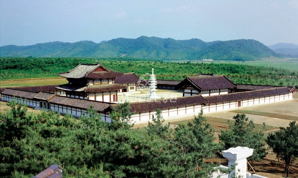 조선민주주의인민공화국 평양 역포구역에있는 정릉사